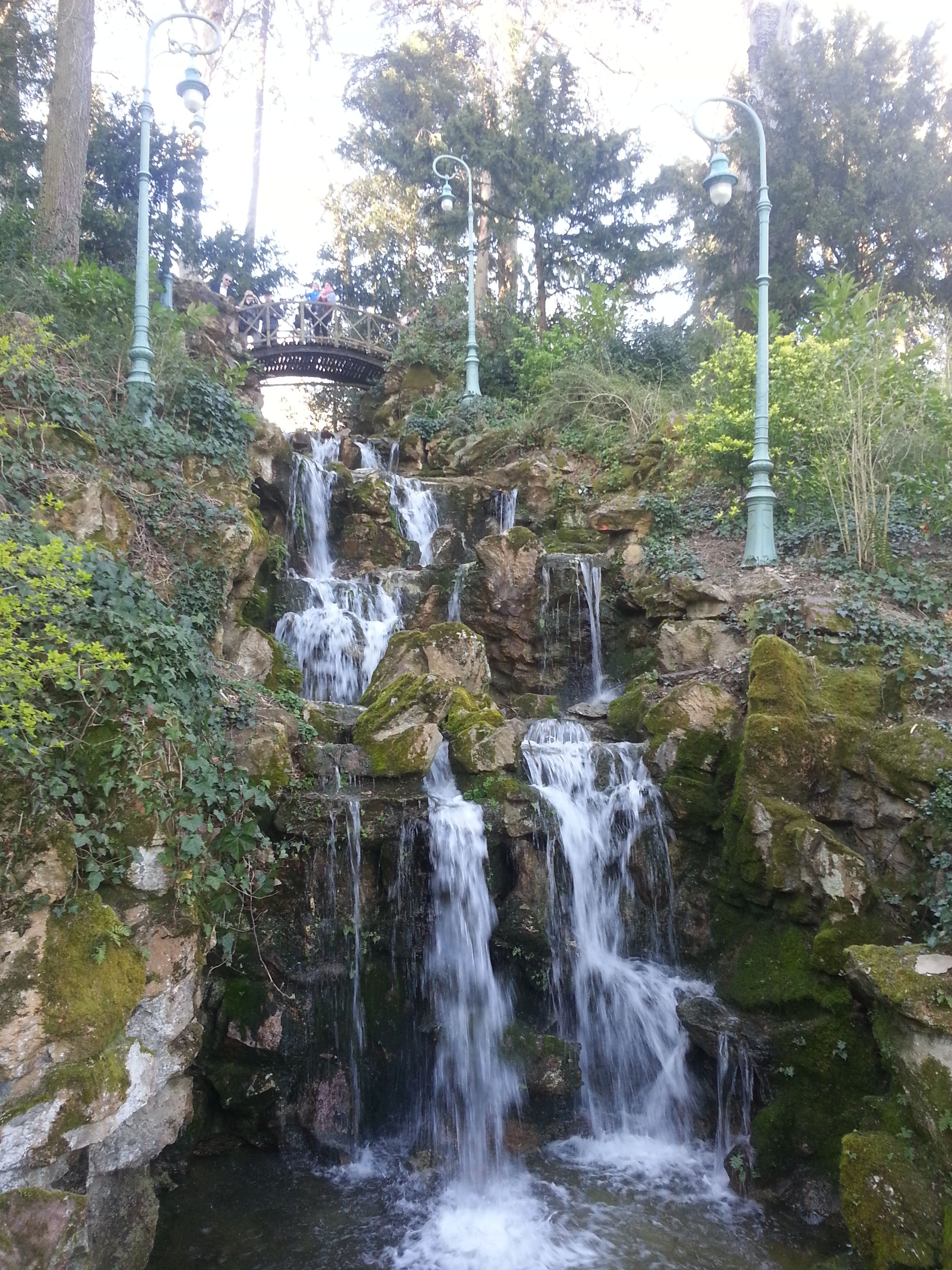 La cascade est fonctionnelle depuis fin 2013.